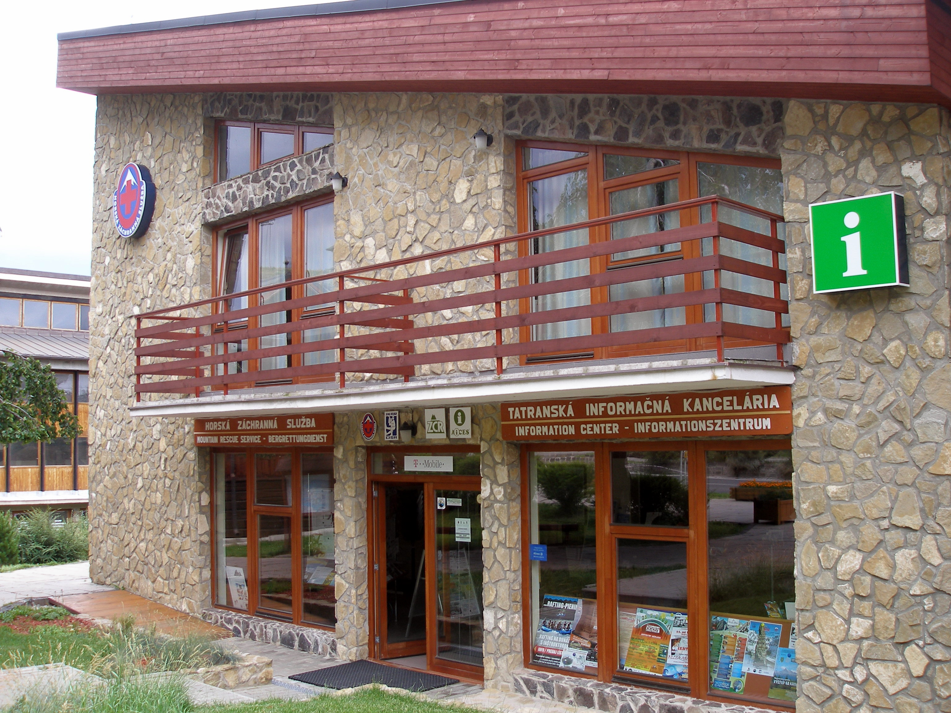 Mesto Vysoké Tatry mestská časť Starý Smokovec.